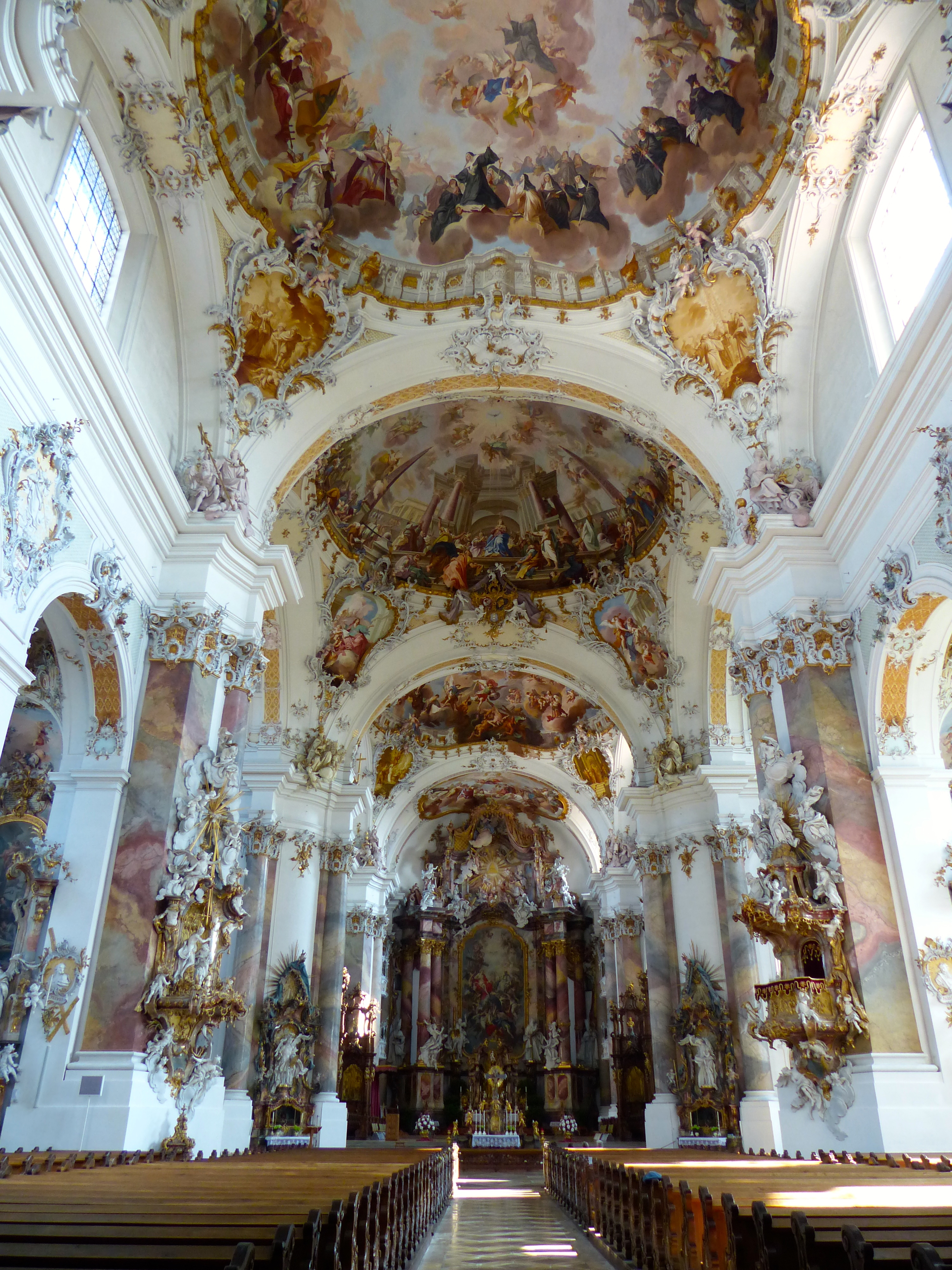 Mittelschiff der Basilika OttobeurenThis is a photograph of an architectural monument.